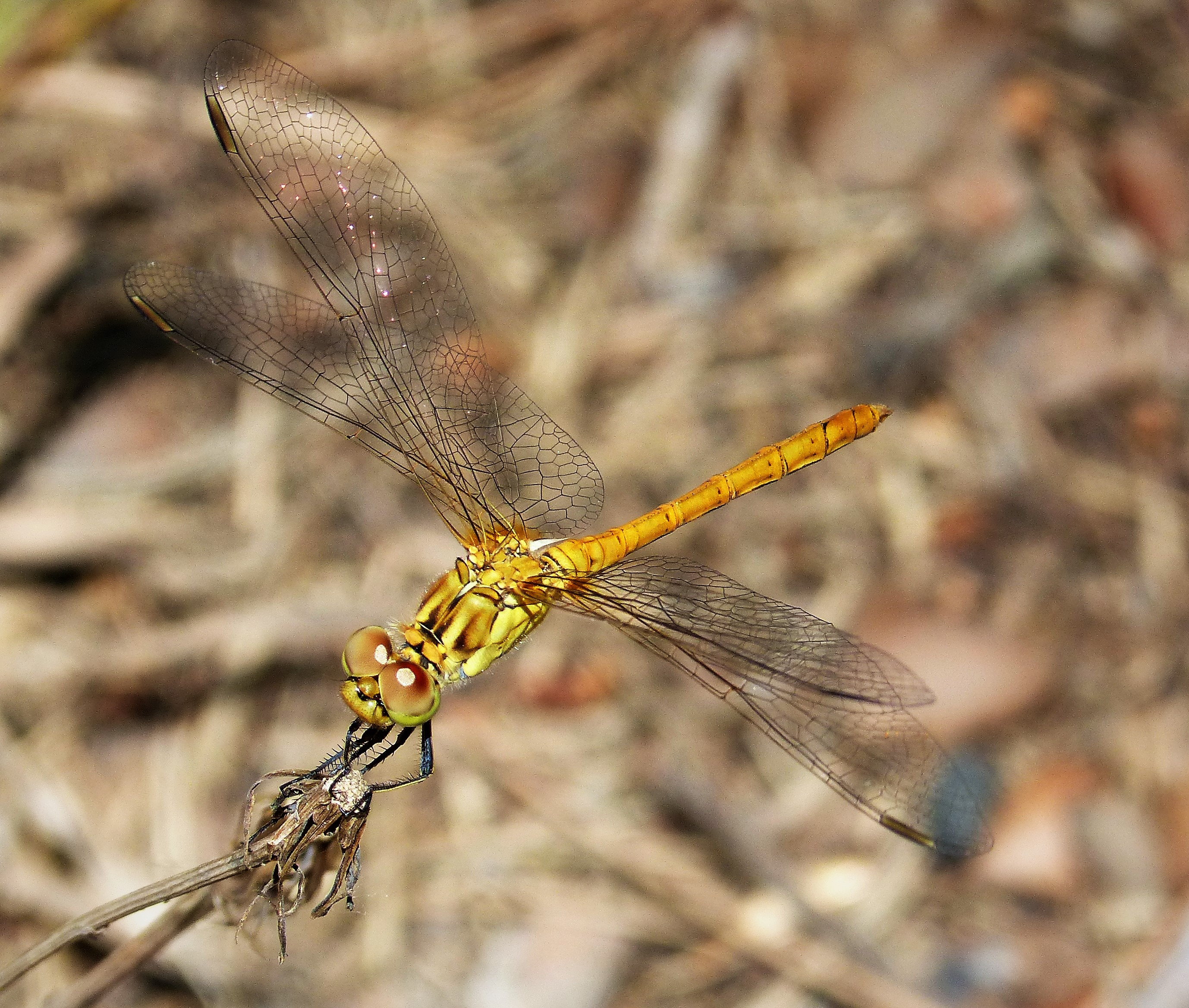 Sympetrum meridionale, young male. Karavasta National Park. Albania